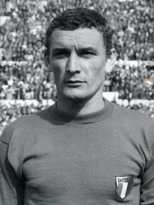 Il calciatore italiano Luigi Riva allo Stadio Olimpico di Roma con la maglia della Nazionale italiana